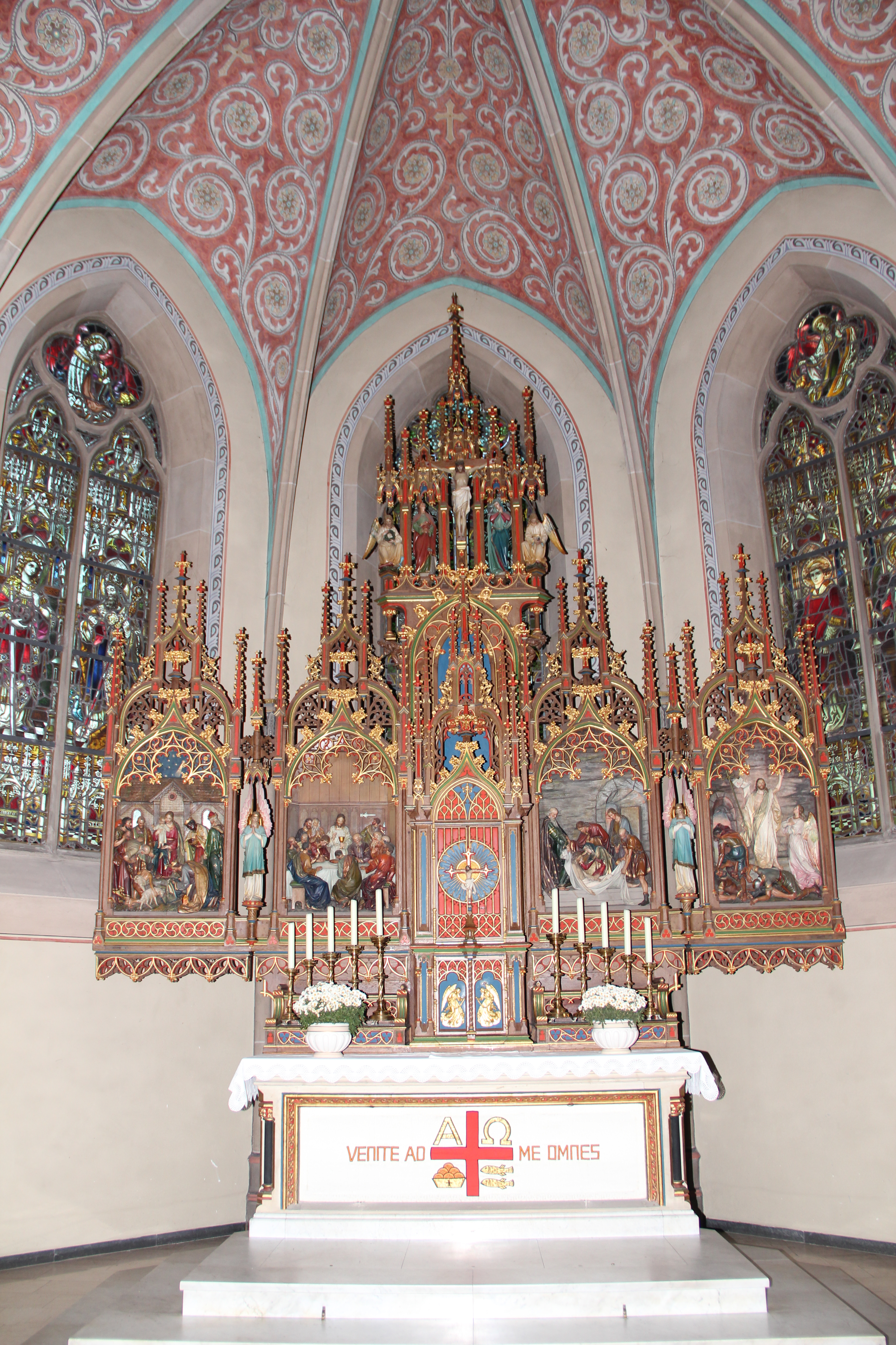 Hochaltar der Sankt-Laurentius-Kirche in Thüle. Der Bildhauer Albert Pehle aus Düsseldorf-Oberkassel schuf in den Jahren 1900–1910 die prachtvollen Altäre (1900 Hochaltar, 1903 Marienaltar, 1910 Josefsaltar).